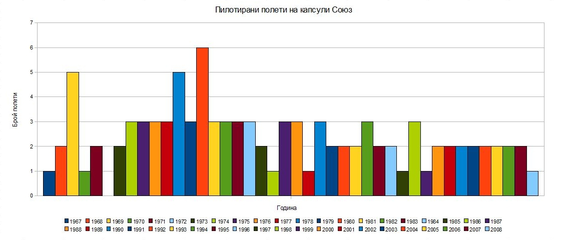 Полети на капсулите Союз